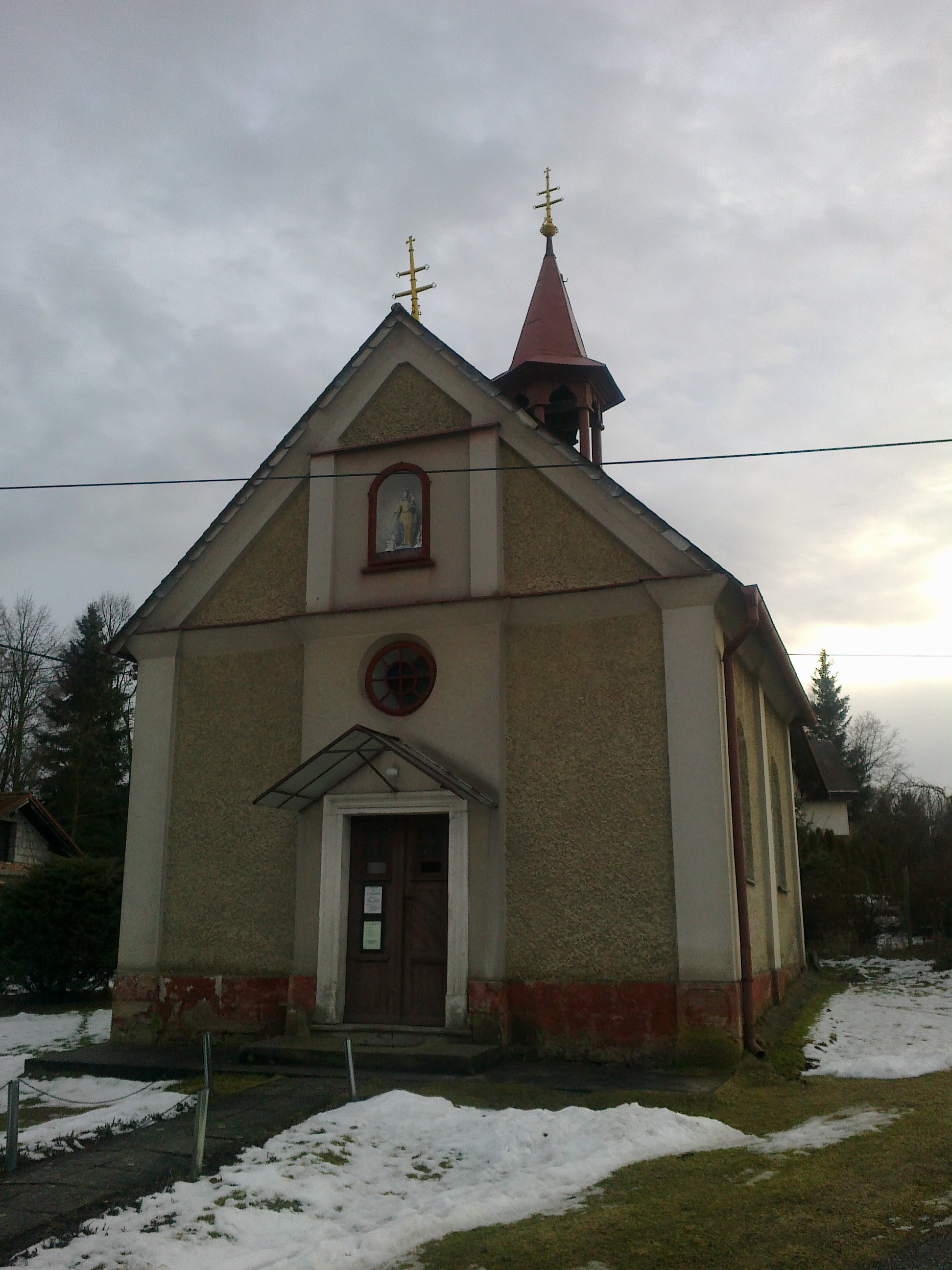 Kaple sv. Cyrila a Metoděje Horní Radechová01